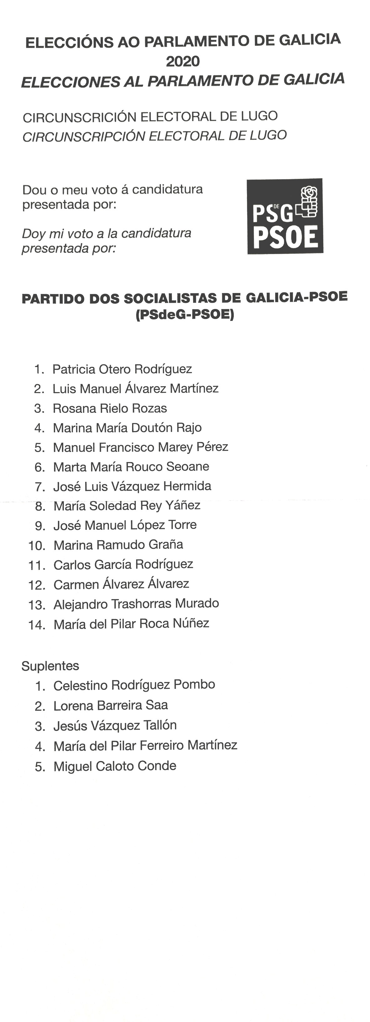 Papeletas electorais Eleccións ao Parlamento de Galicia 2020 pospostas circunscrición electoral de Lugo-PSdeG PSOE